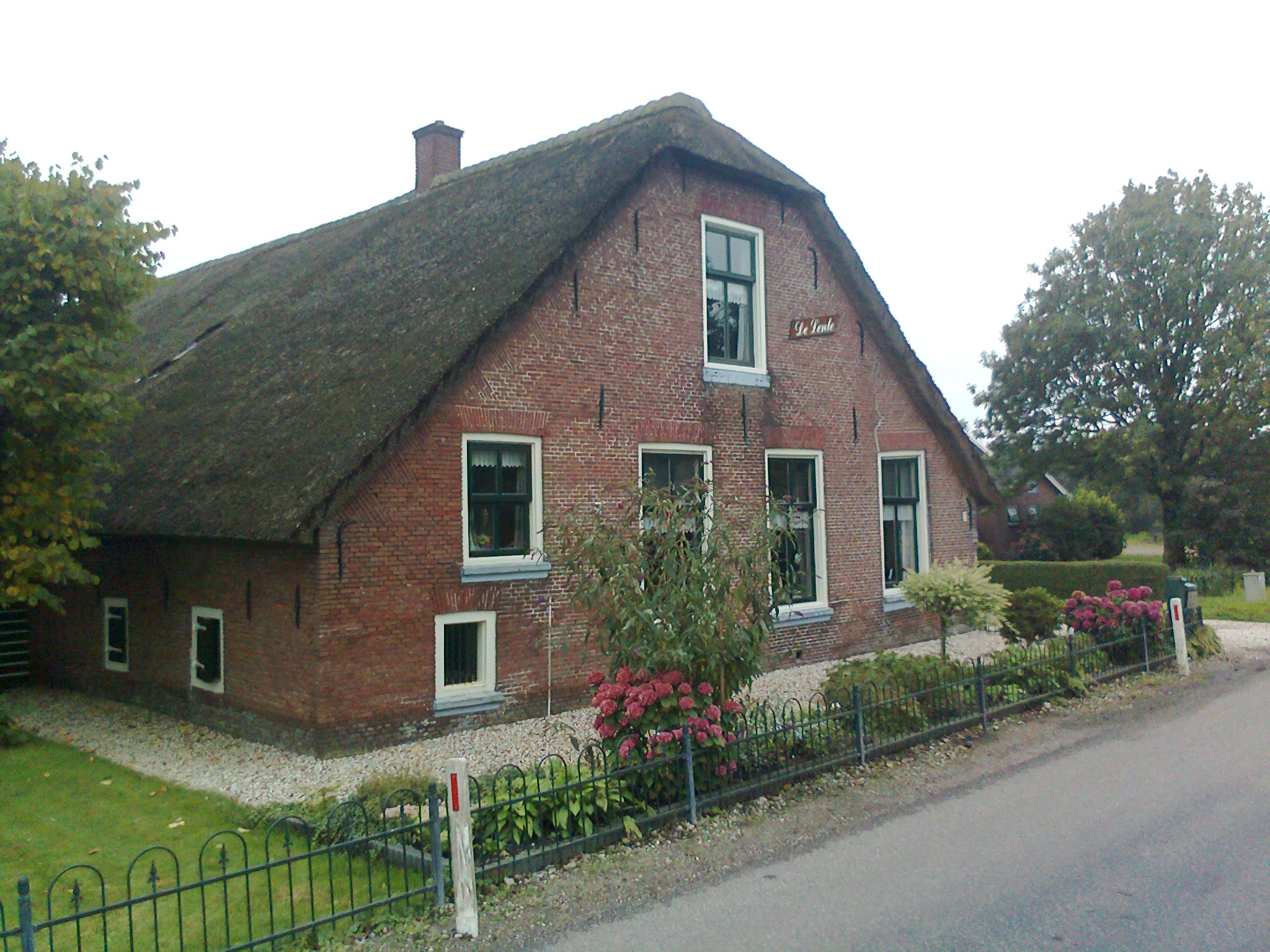 "de Lente", boerderij, langhuis, afgewolfde gevel